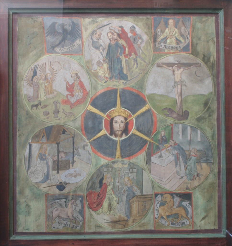 Pfarr- und Wallfahrtskirche Sachseln, Schweiz, Betrachtungsbild